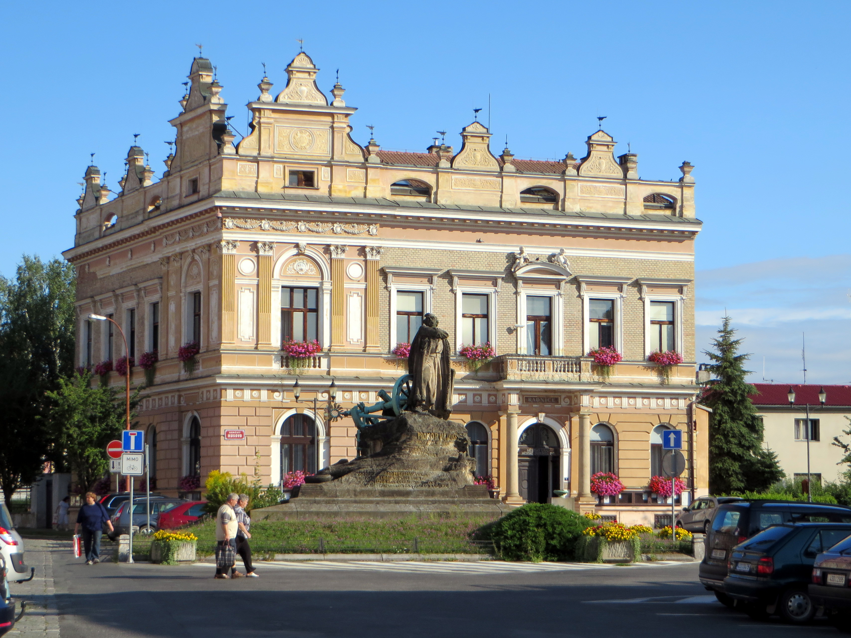 Městský úřad a pomník Prokopa Holého, náměstí Husovo č.p. 70.